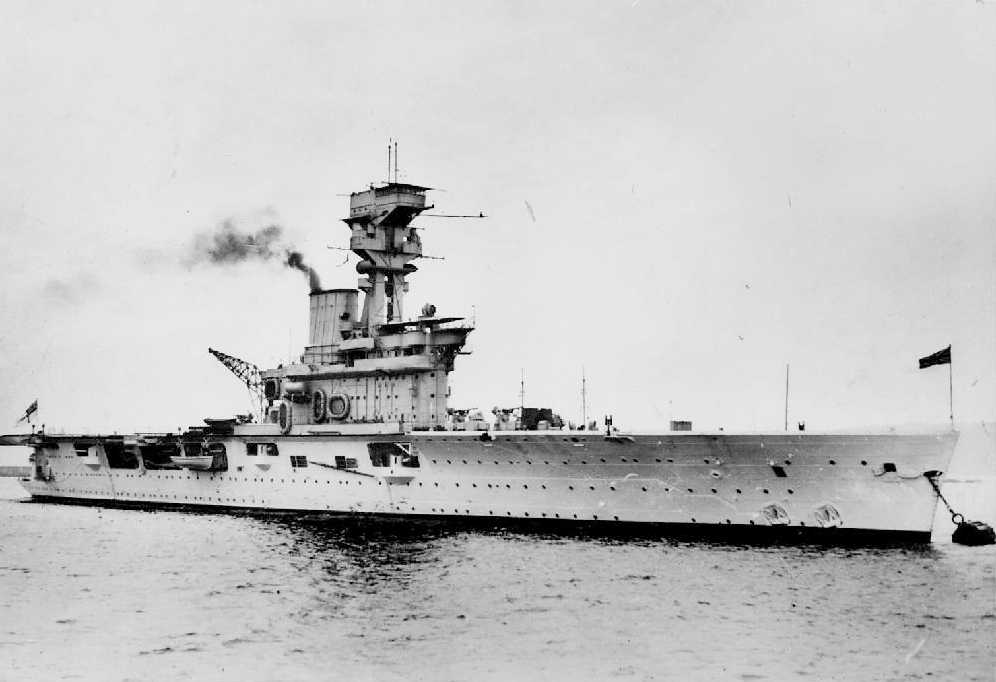 Der britische Flugzeugträger HERMES 1934